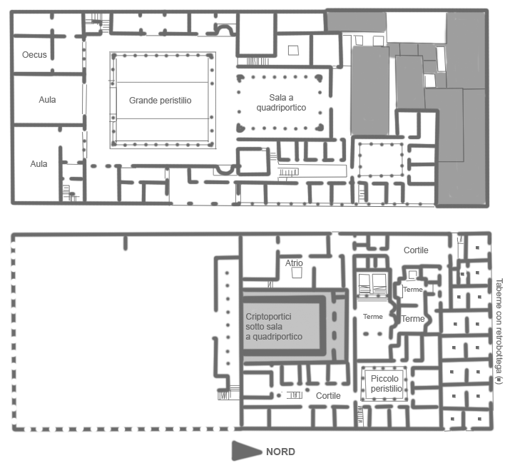 Tolemaide (Cirenaica, Libia), Palazzo delle Colonne, schizzo planimetrico con scritte